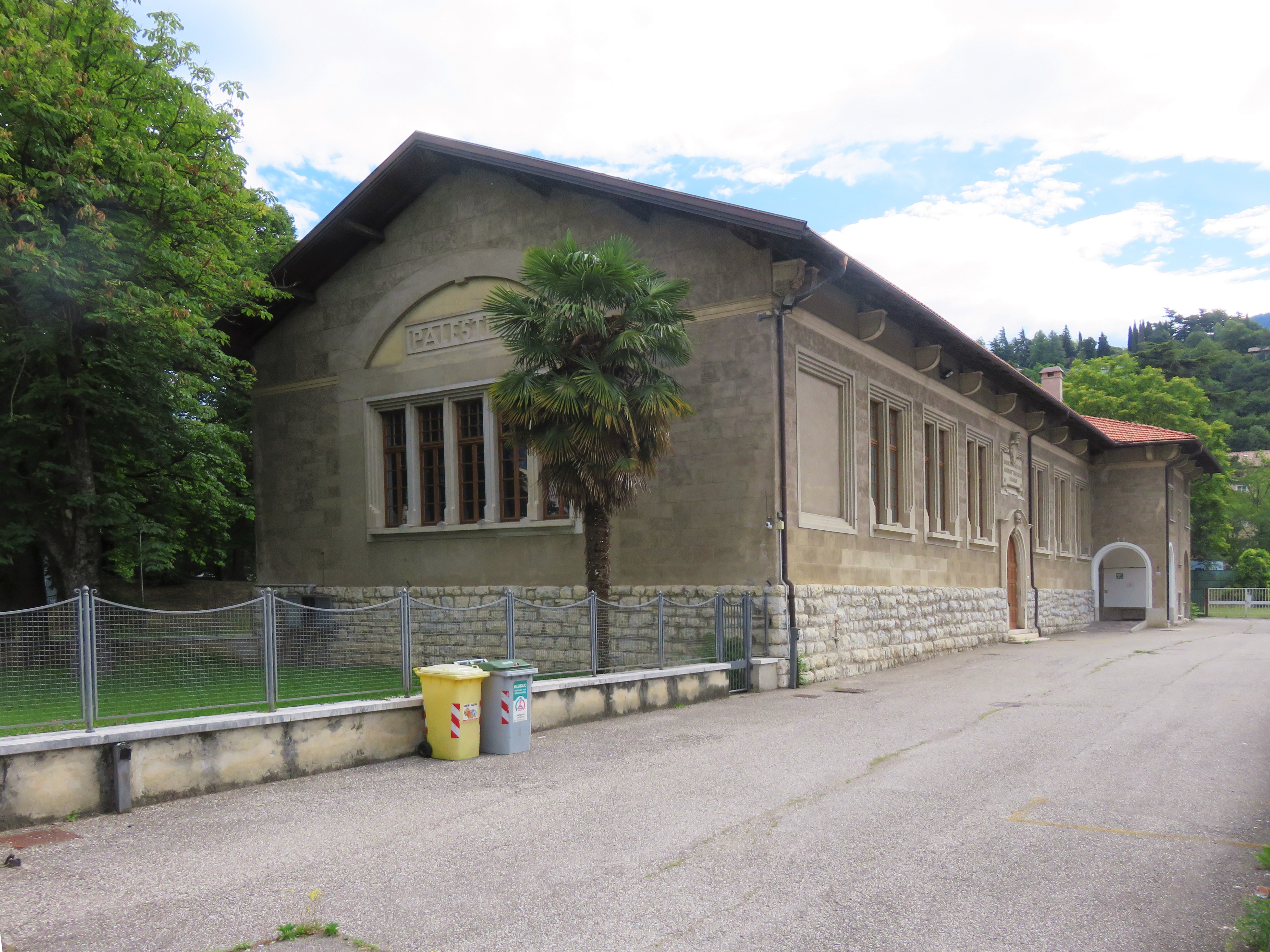 Palestra in via San Giovanni Bosco, a lungo usata dall’Istituto Istruzione Superiore don Milani